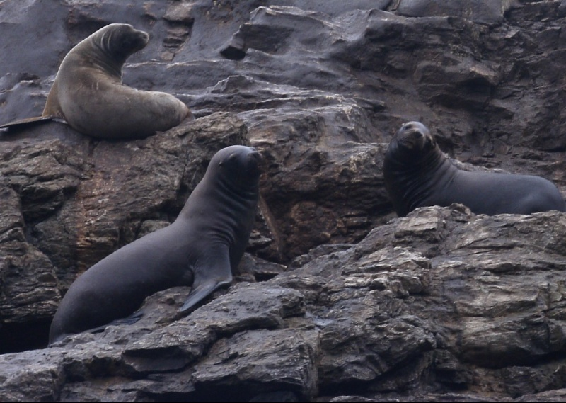 Lobera en Isla Choros, Chile